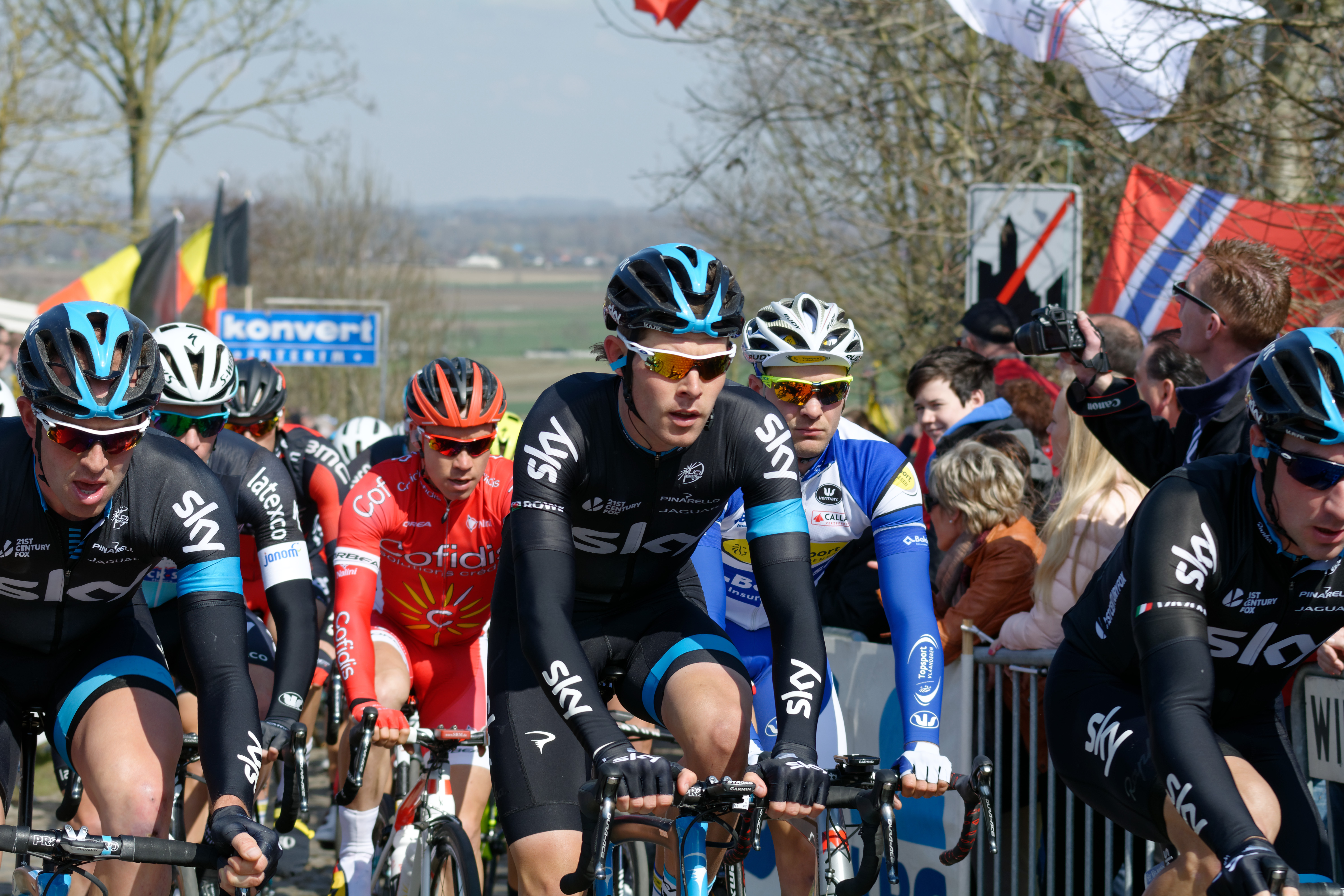 D71_6236_DxO